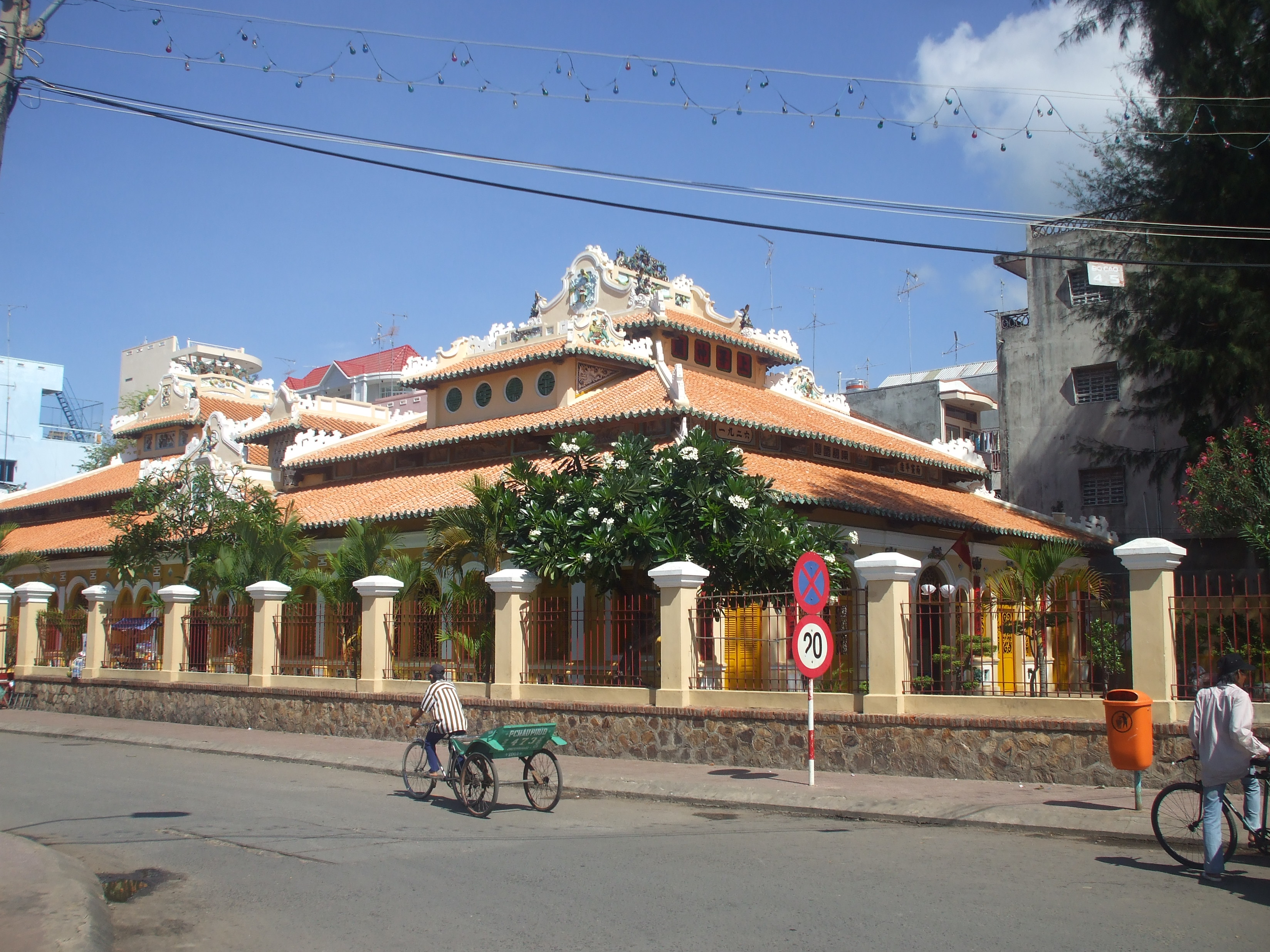 Đình Châu Phú thờ tướng Nguyễn Hữu Cảnh tại trung tâm thị xã Châu Đốc (An Giang, Việt Nam).